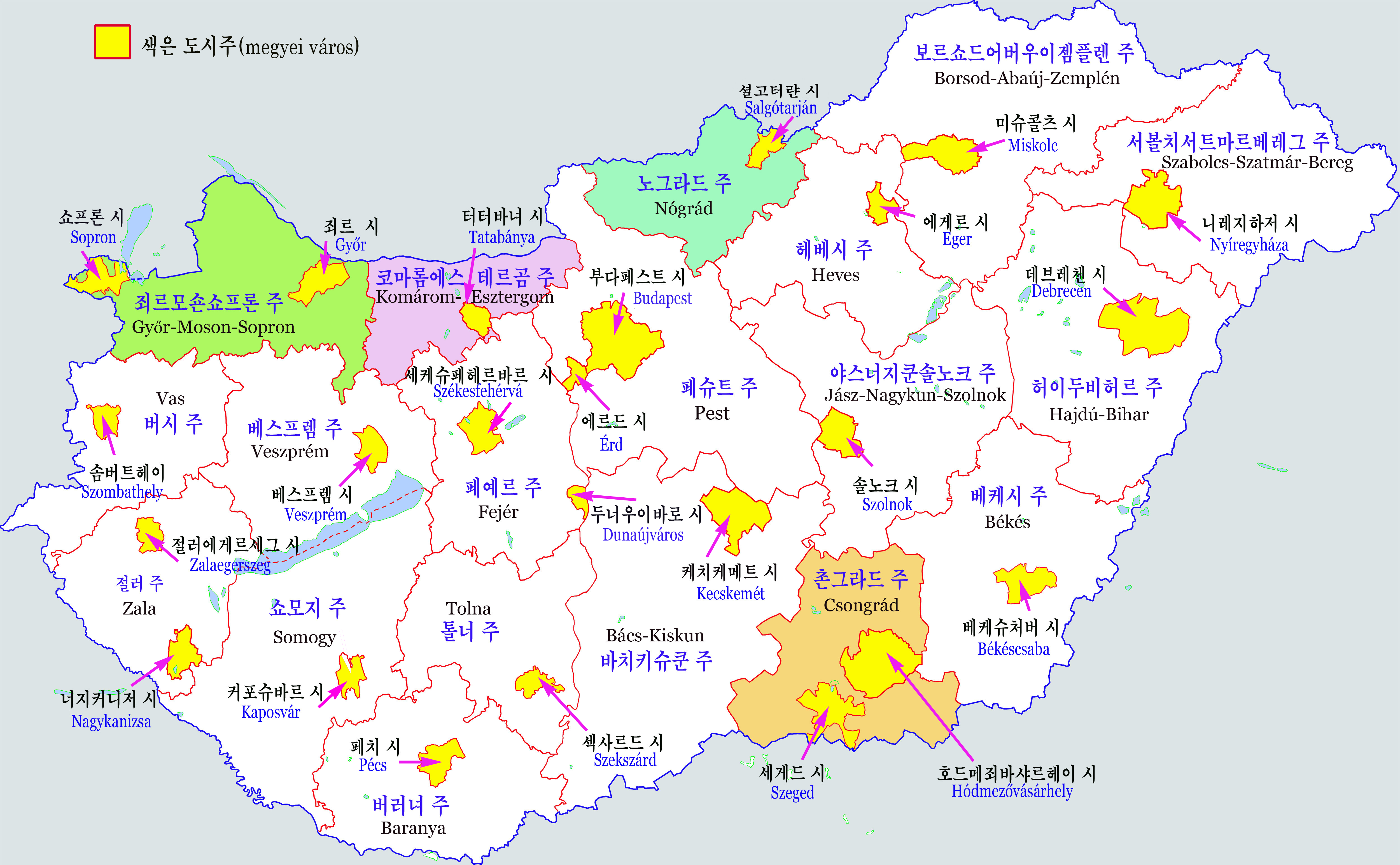 헝가리 행정구역